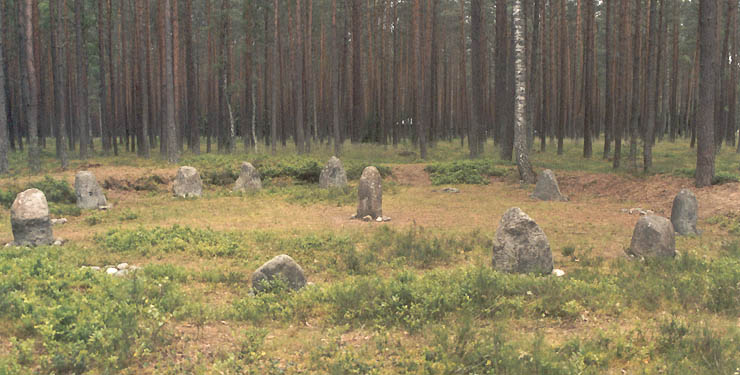 Krą…g kamienny w Grzybnicy, Polska. Fot. Agnieszka Kwiecień Nova, 06.2004